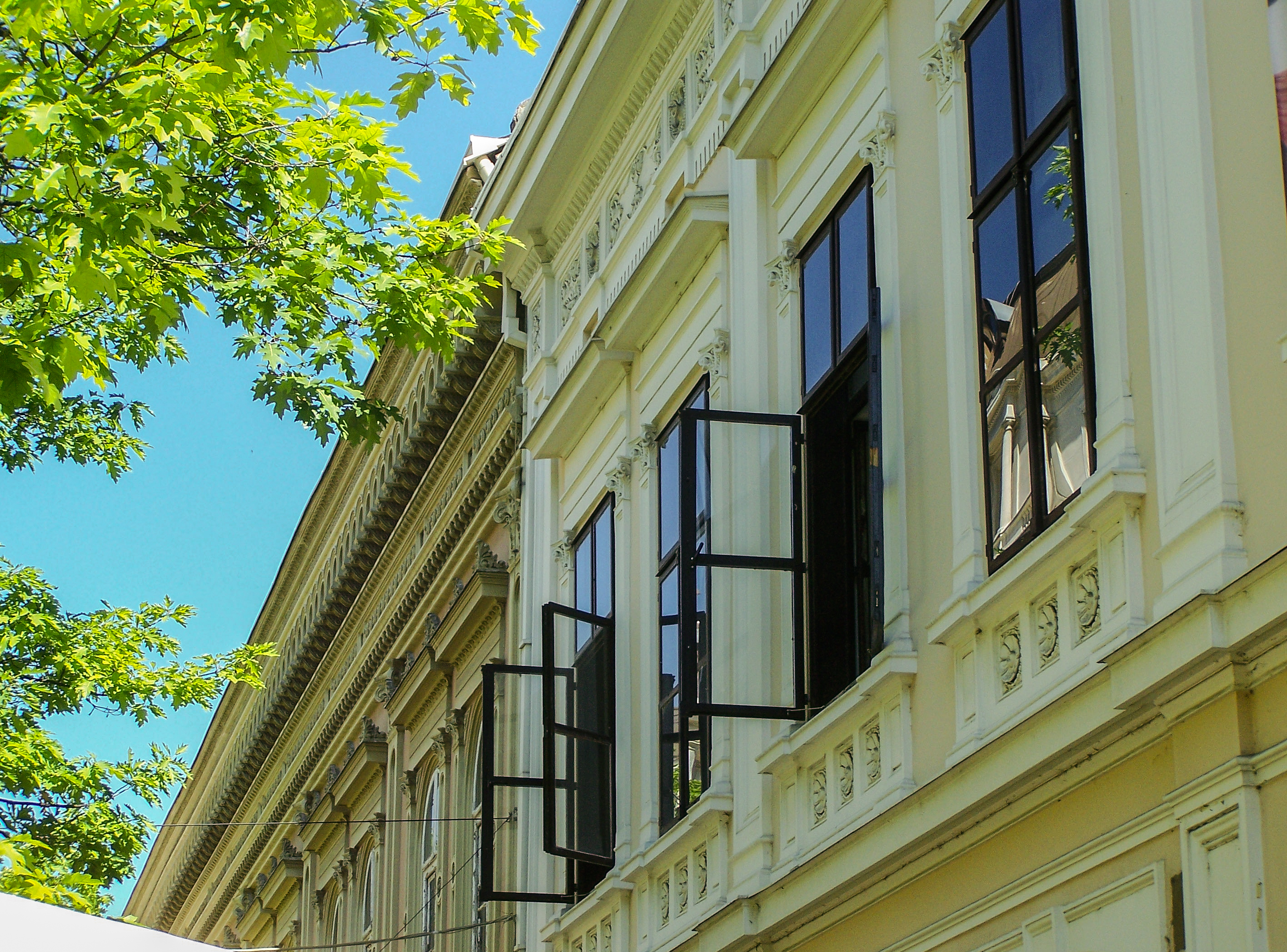 Detalj sa kuće na broju 48 u Knez Mihailovoj ulici